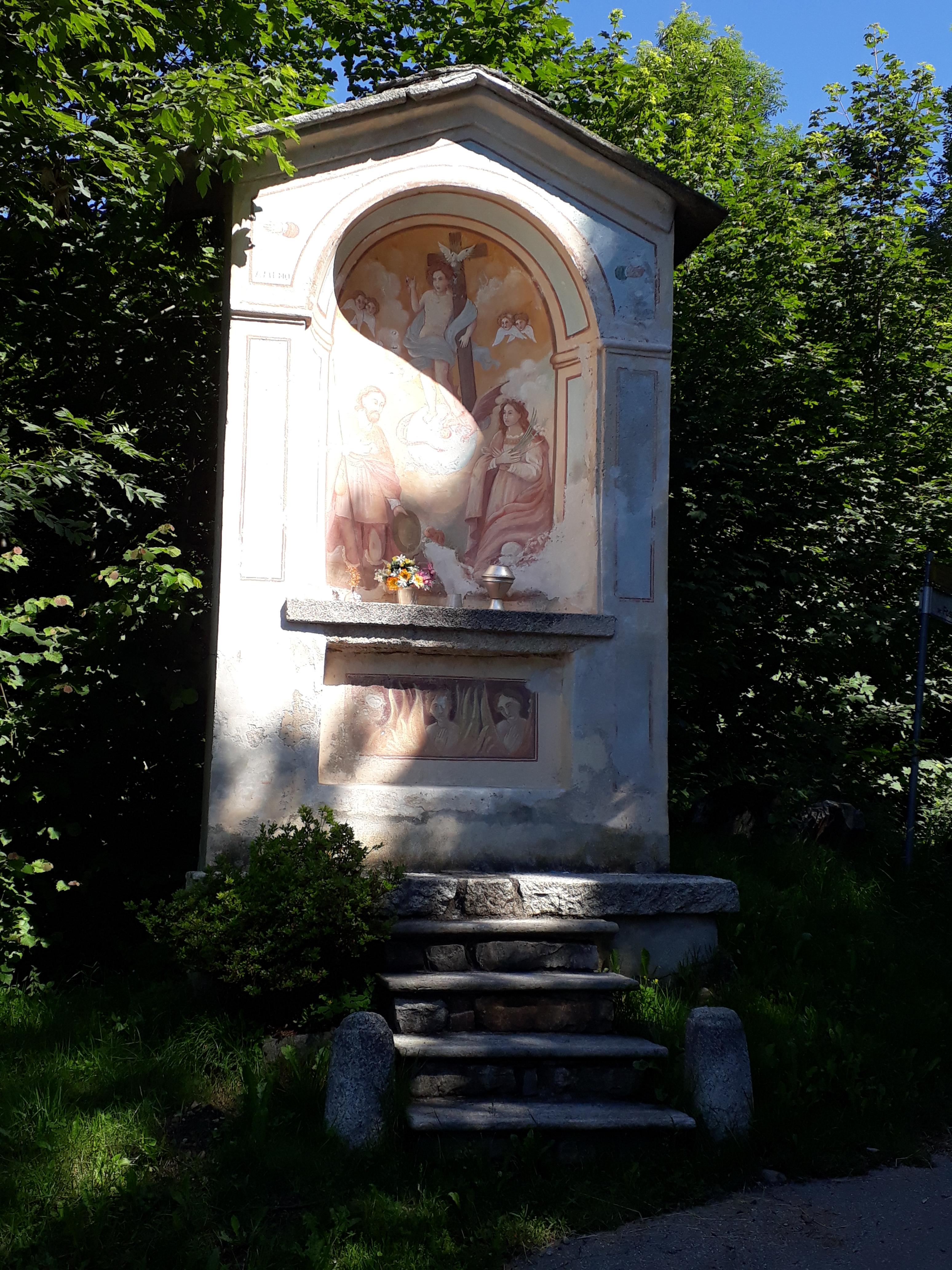 cappelletta votiva in via del Cimitero